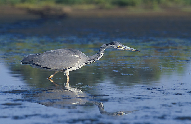 Ardea cinerea